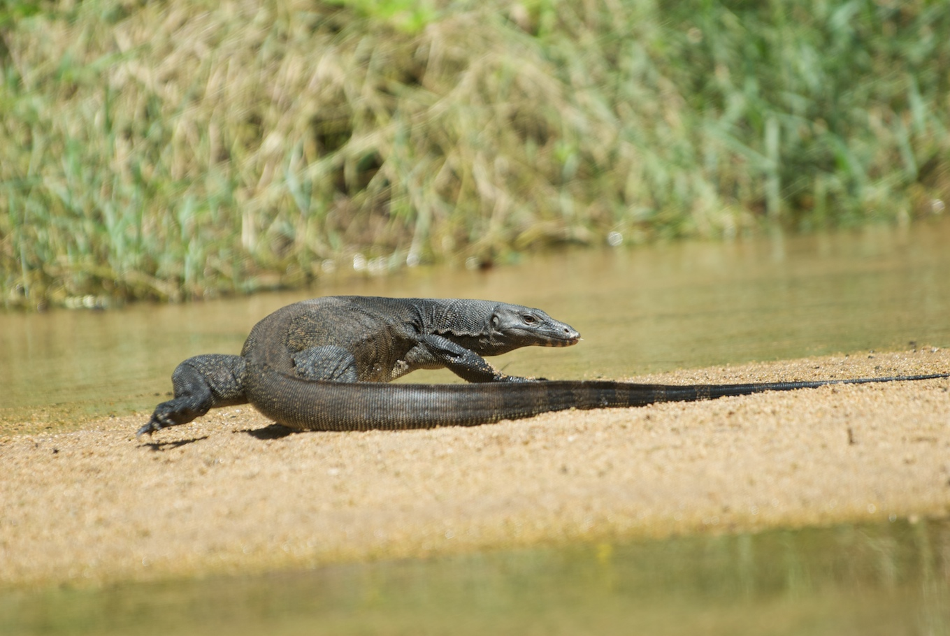 Tioman island, Malaysia